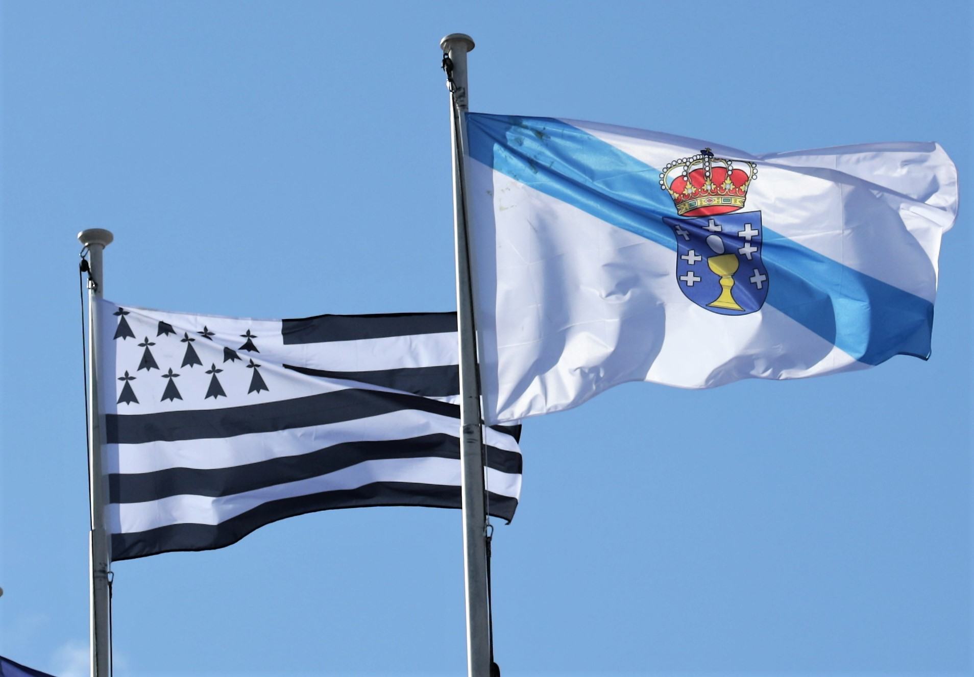 Drapeaux de la Bretagne et de la Galice pendant le festival interceltique de Lorient 2019